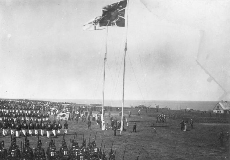 Helgoland Besitzergreifung durch S.M. Kaiser Wilhelm II., Parademarsch, 10. August 1890